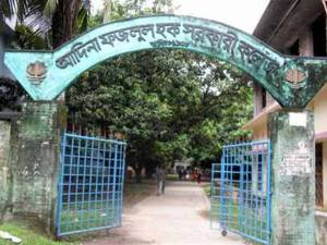 আদিনা ফজলুল হক সরকারি কলেজ